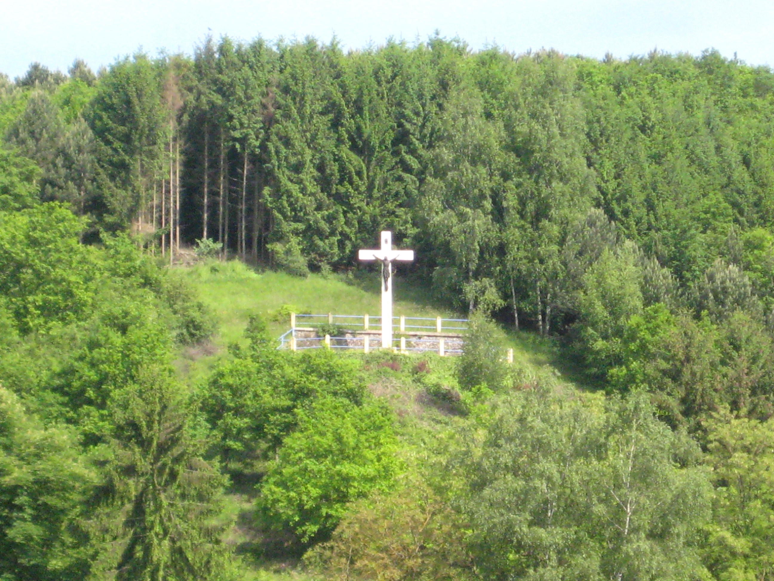 Description Calvaire de Moyeuvre Petite Date22 May 2009Sourcemon appareil photoAuthorAimelaime Calvaire de Moyeuvre Petite